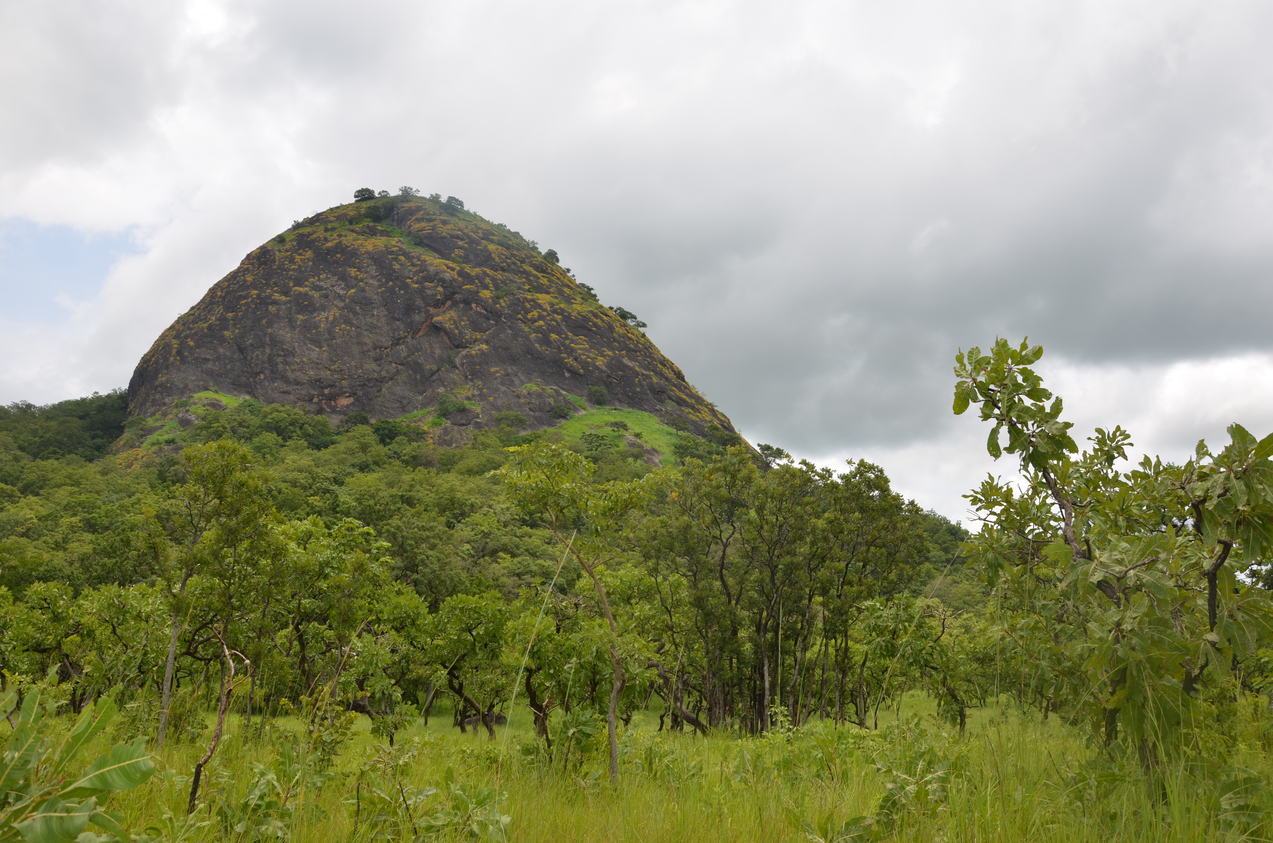 Une vue sur la montagne du Parc National de Fazao.